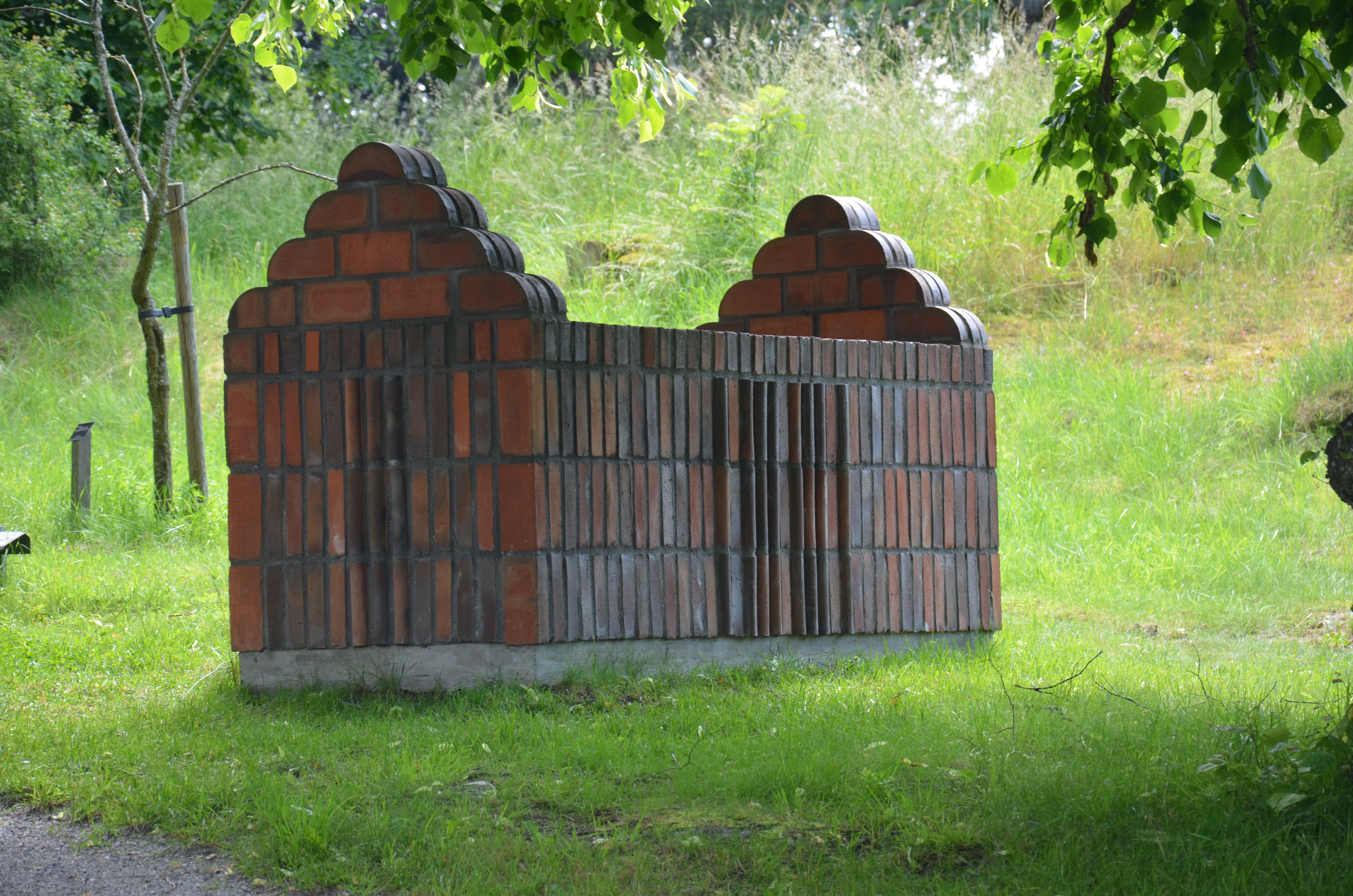 Ulla Viottis Bibliotek - Sarkofag, tegel, 2008, Görvelns slotts skulpturpark